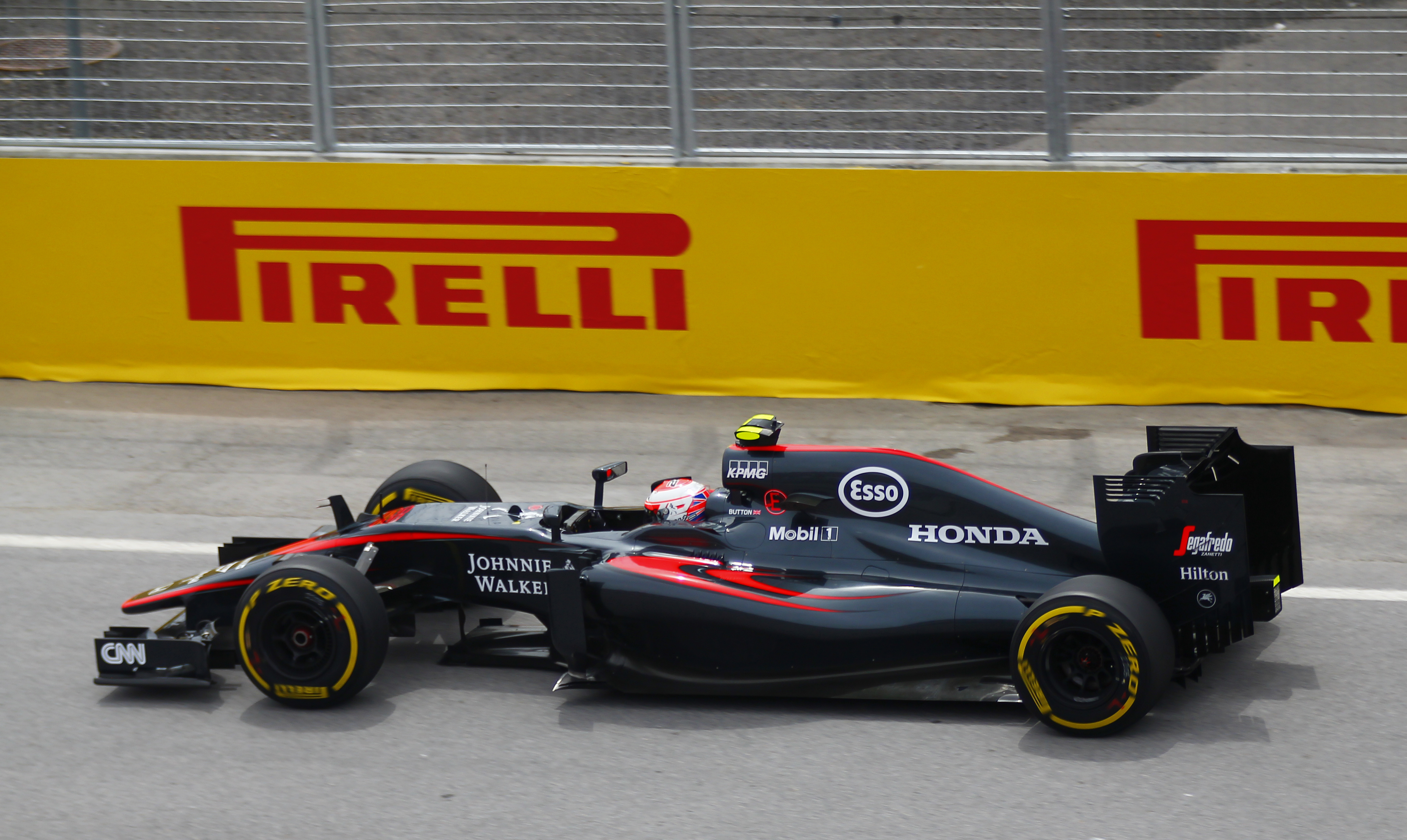 Jenson Button - McLaren Racing - Grand Prix du Canada - Circuit Gilles-Villeneuve - 7 juin 2015 (Photo Paul-Émile Poulin-Jacques)